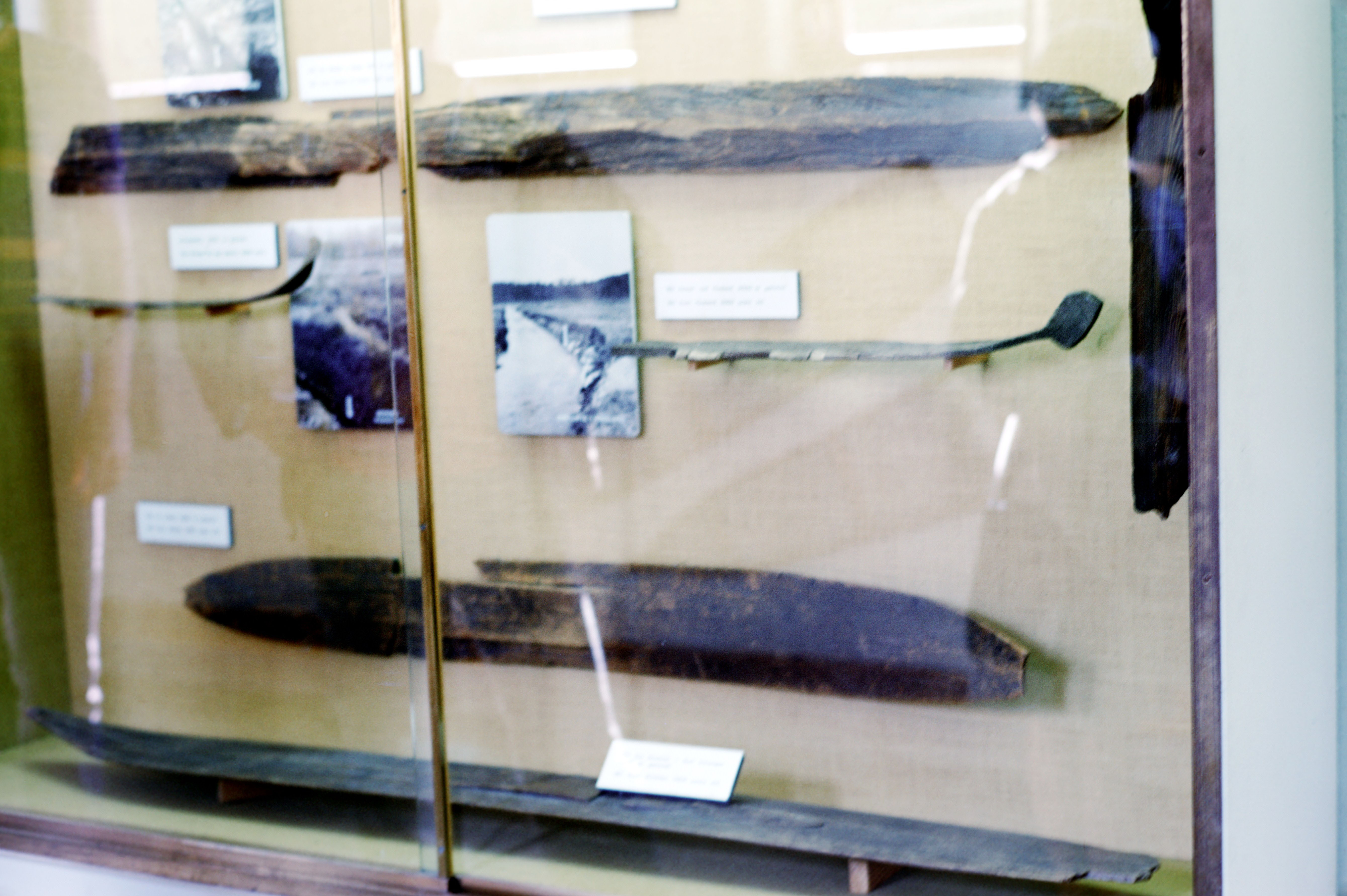 Une vitrine avec des skis. Musée du Ski d’Holmenkollen (Skimuseet i Holmenkollen) à Oslo. Août 1972. Oslo (Holmenkollen), Norvège.